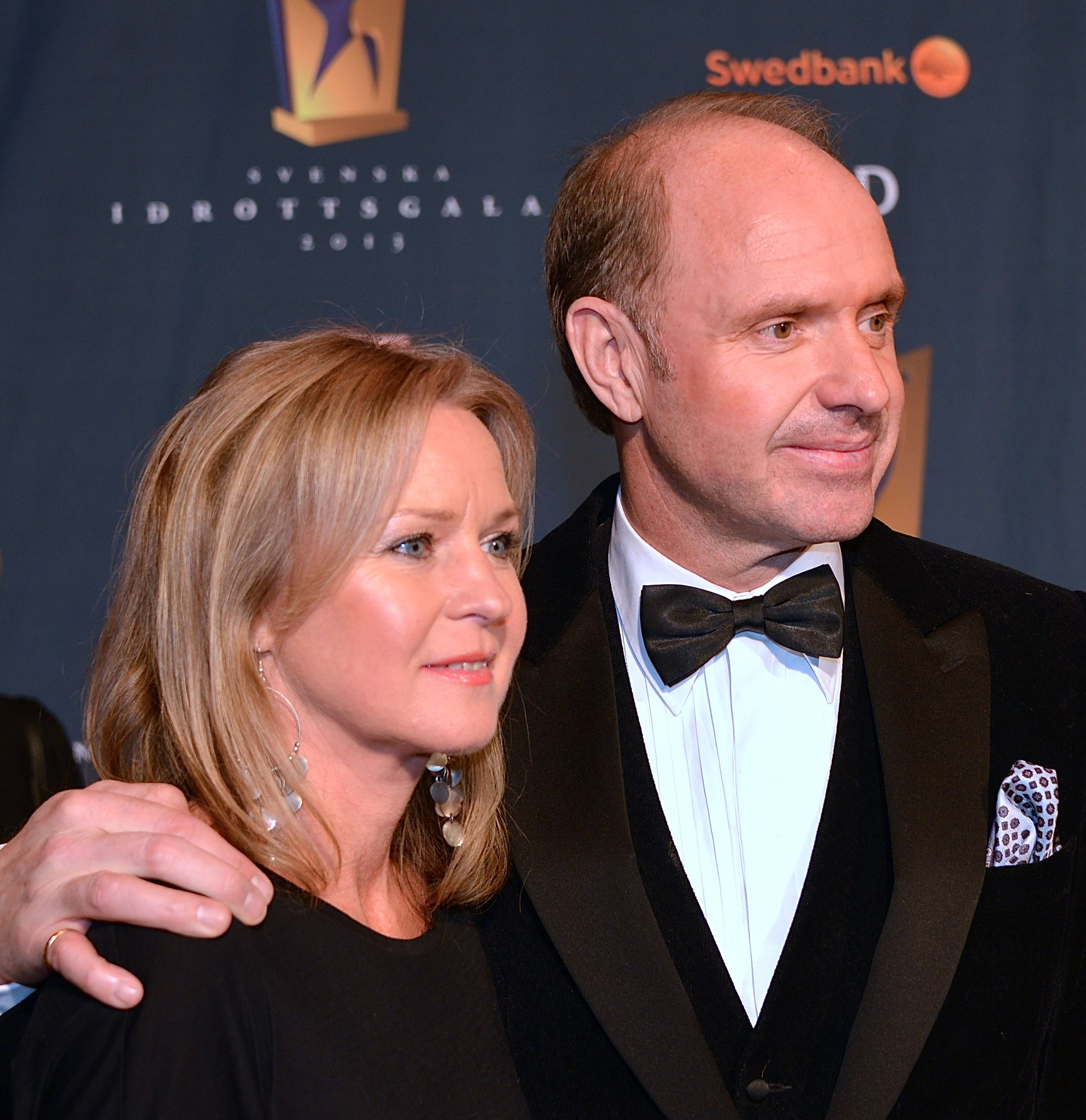 Thomas och Cathrine Ravelli på Idrottsgalan på Globen i Stockholm den 14 januari 2013.